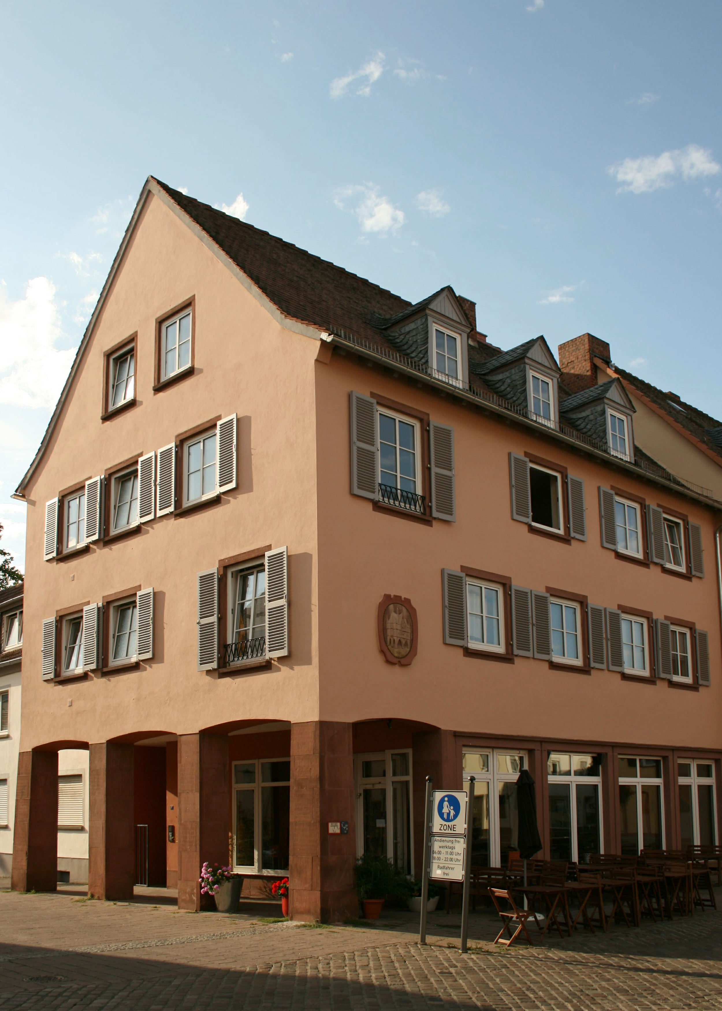 Sogenanntes Spielhaus, ältestes Rathaus der Stadt Hanau, Neubau des kriegszerstörten Gebäudes von 1953.